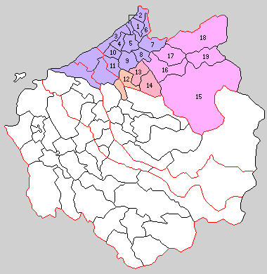 滋賀県犬上郡の町村制時点の町村。